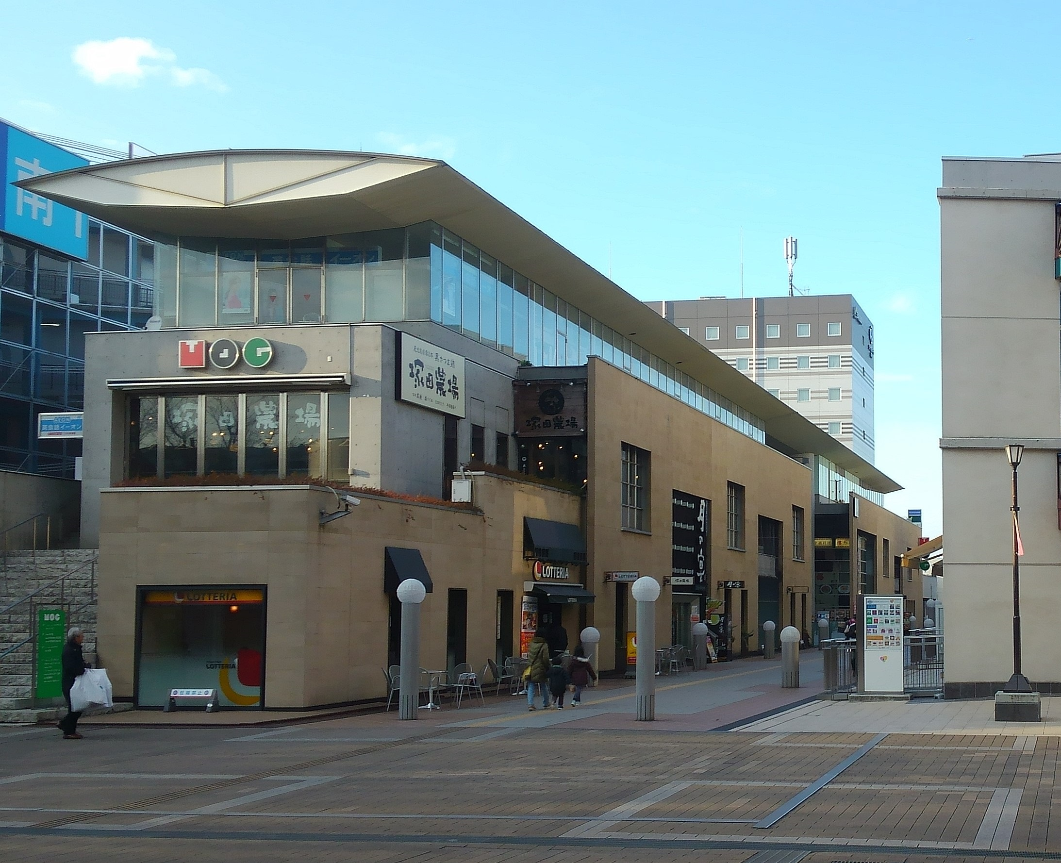 つくばクレオスクエアの一部分、MOG